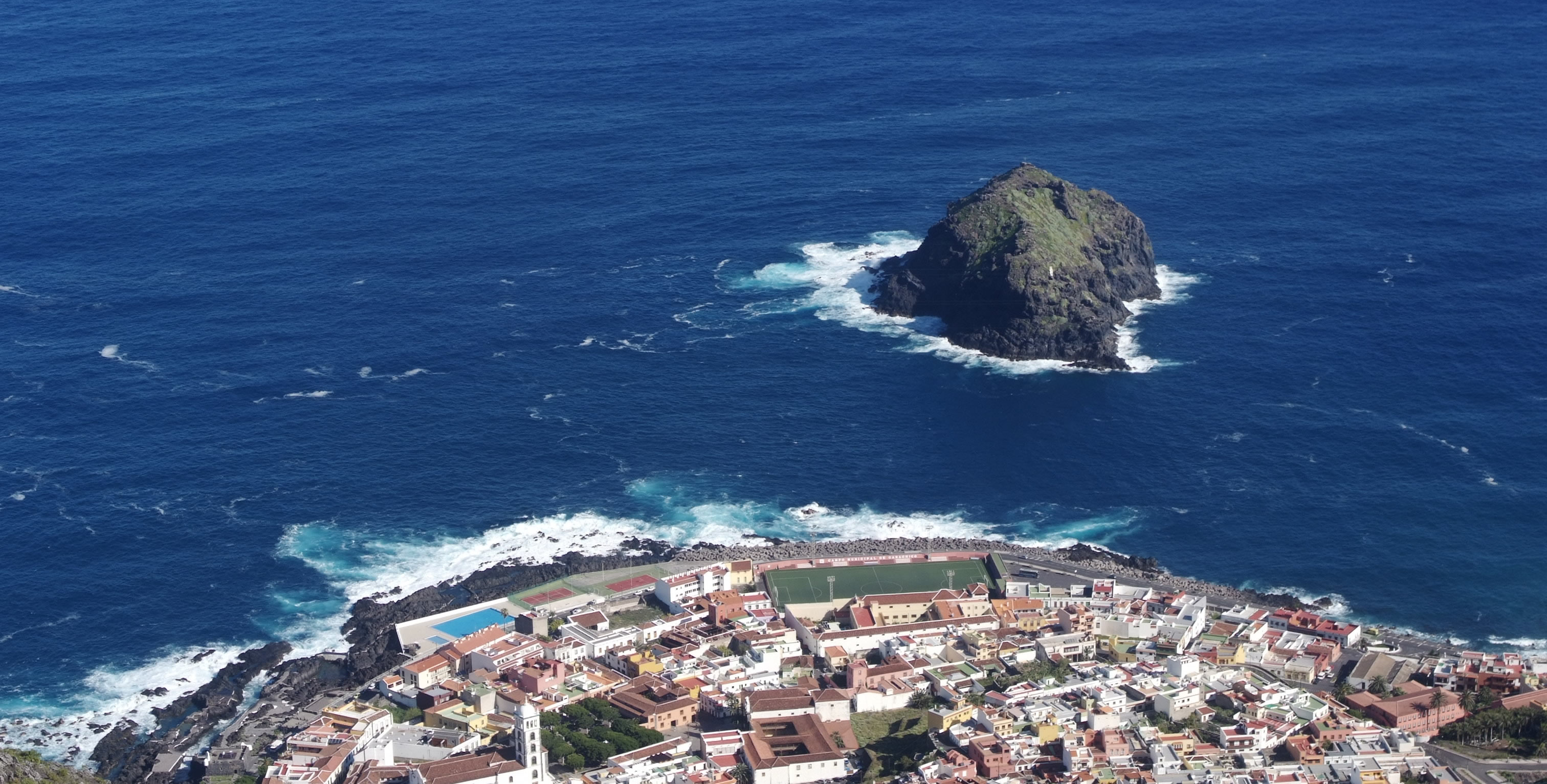 Vista de Garachico (Tenerife)